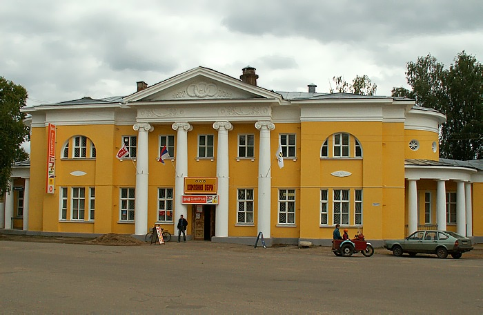 Здание бывших яслей (1912), арх. В. Адамович, В. Жолтовский